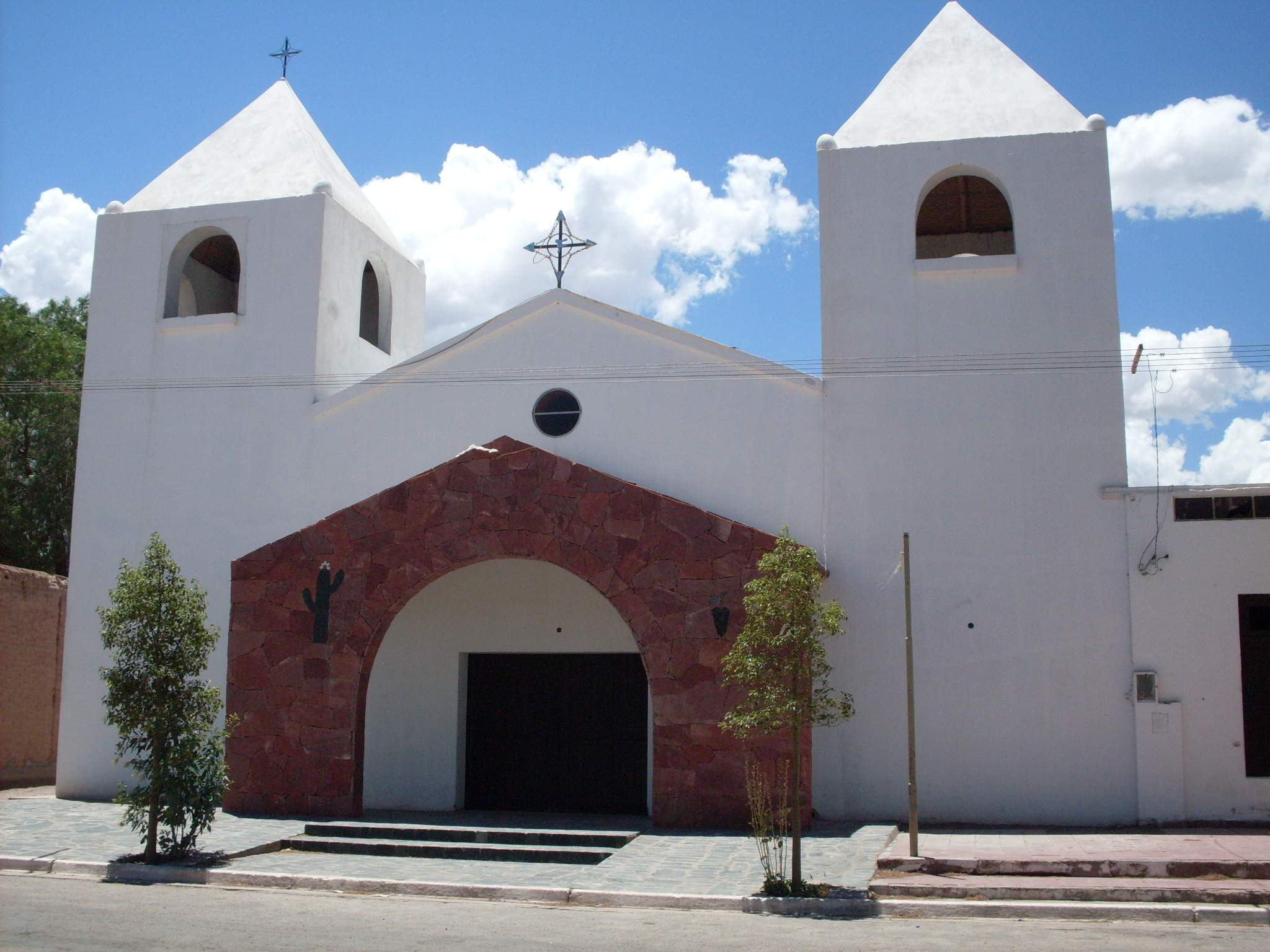 Iglesia de Fiambalá, Catamarca, Argentina.